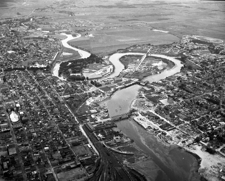 Vue aérienne de Québec en 1945. Remarquez les ponts à bascule, le méandre de la rivière Saint-Charles qui ne disparaîtra qu’à partir de 1955, l’hospice Saint-Charles (hôpital de la Marine) près du pont Drouin, le marché Saint-Roch voisin, les ruines de l’aréna du parc Victoria détruit par les flammes le 30 juin 1942 et le stade municipal construit en 1938. Photo avec Aréna en ruines - Hôpital de la Marine - Marché Saint-Roch, Pont Dorchester, Pointe-aux-Lièvres, Pont Drouin et Rivière Lairet.